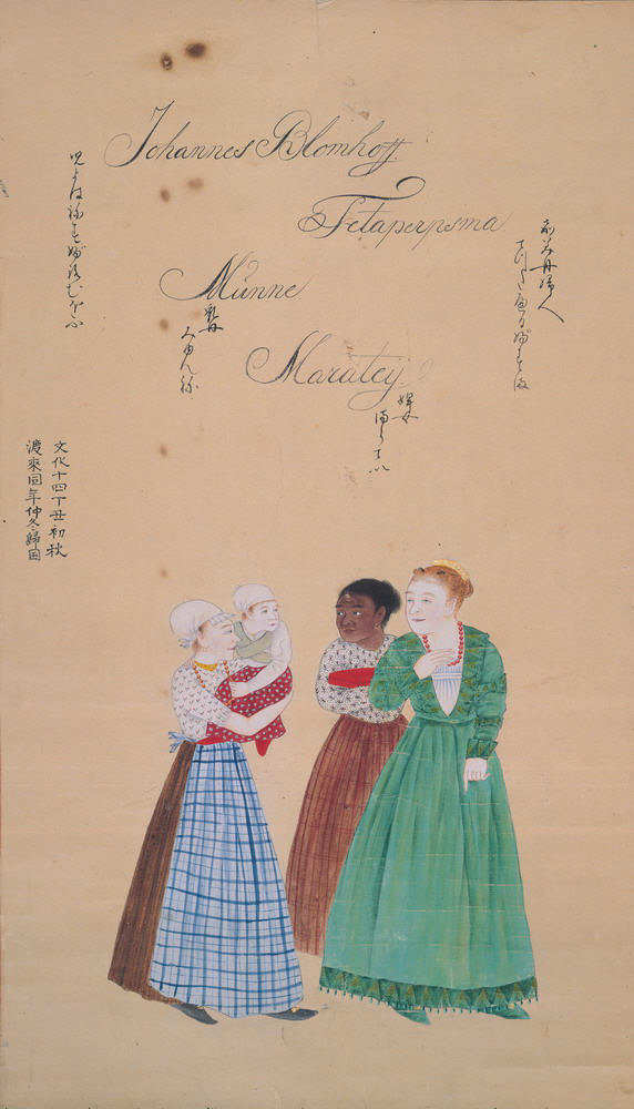 Schildering in inkt en waterverf, voorstellend van rechts naar links Titia, de vrouw van Jan Cock Blomhoff, de bediende Marateij, het zoontje Johannes Blomhoff en de min Petronella Munts. De tekst links verwijst naar de komst van deze personen in 1817 en de afbeelding in hetzelfde jaar. Deze ongesigneerde schildering lijkt compositorisch sterk op bekend werk van Ishizaki Yûshi, maar is niet van zijn hand.